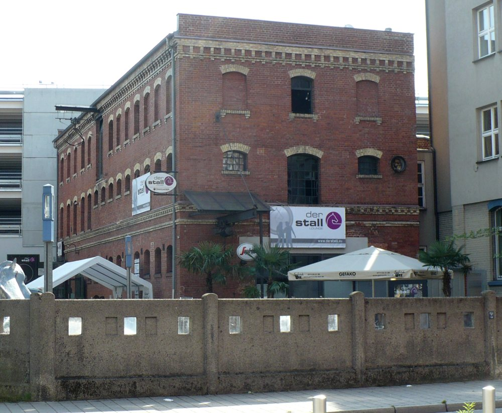 Ehemaliger Pferdestall in Esslingen, Martinstraße 27/1